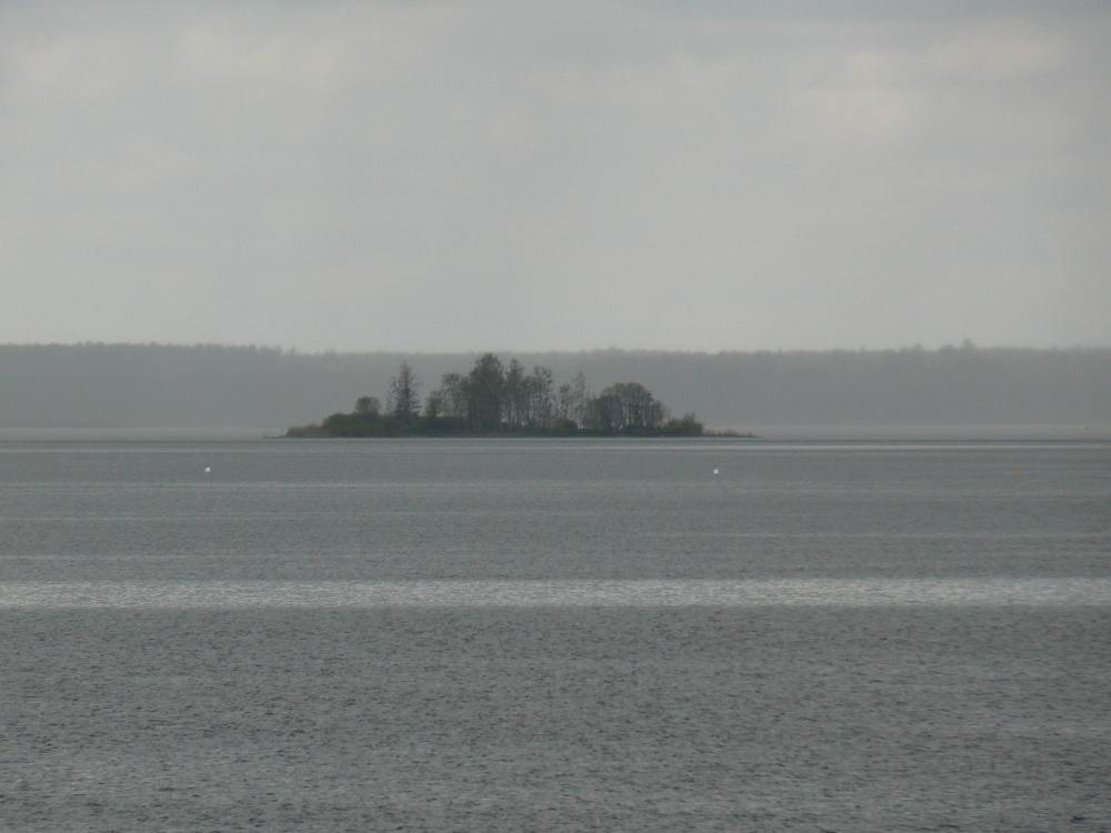 Tondisaar Võrtsjärvel